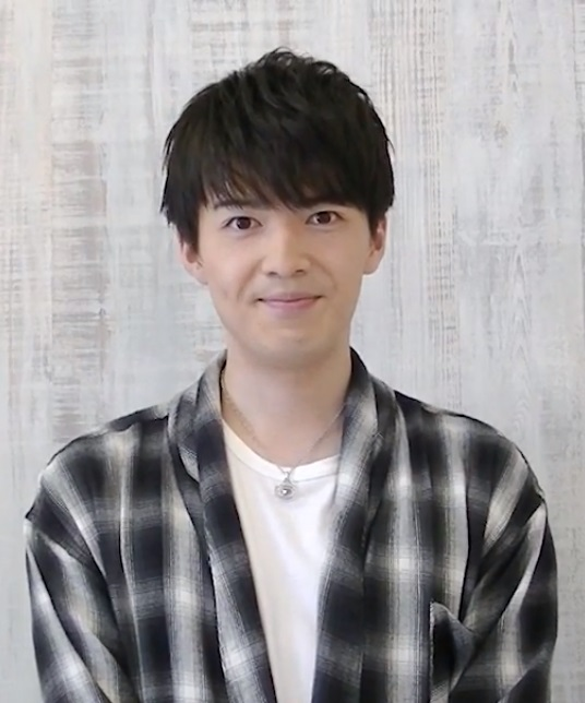 坂垣怜次（俳優）